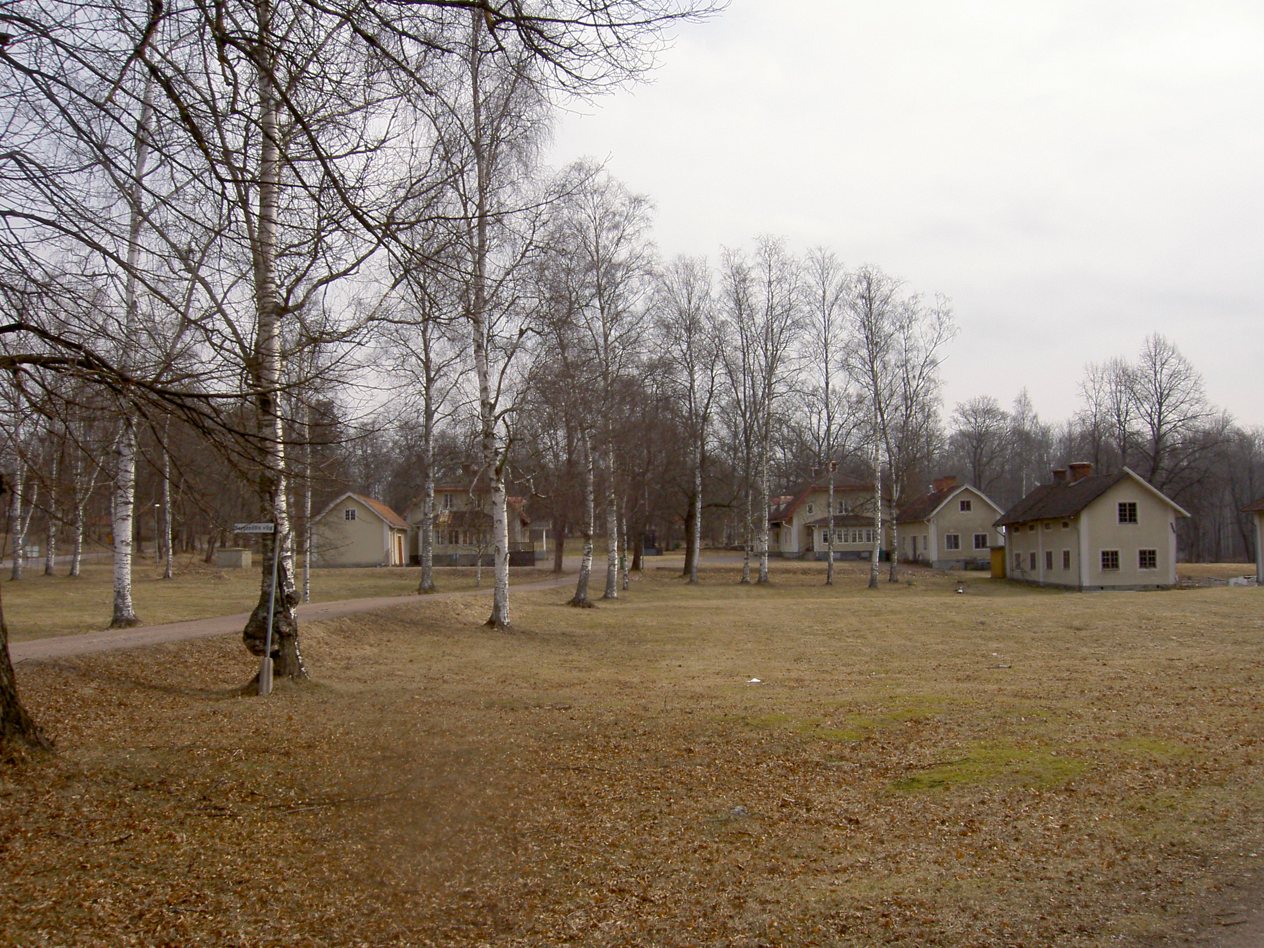 Bruksparken, Horndal, Sverige/Sweden